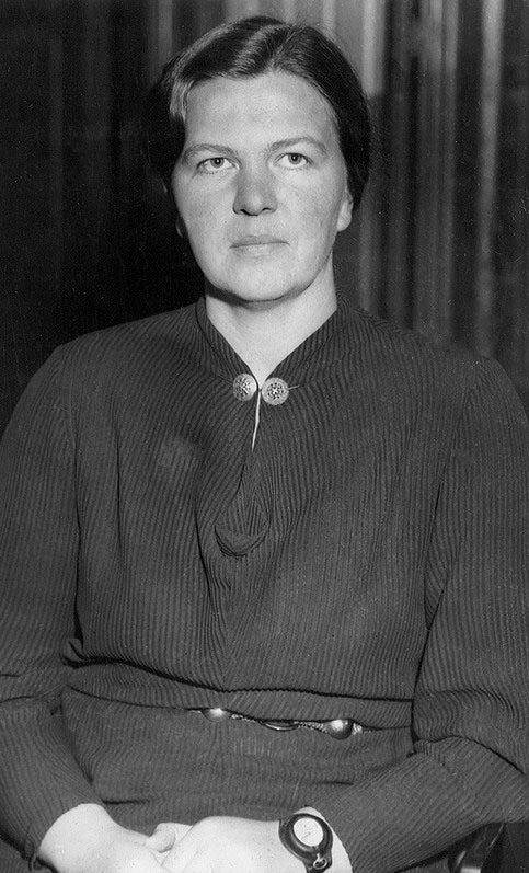 Helga Stene, portrett, kvinne, lektor, kvinnesaksforkjemper, sittende halvfigur.